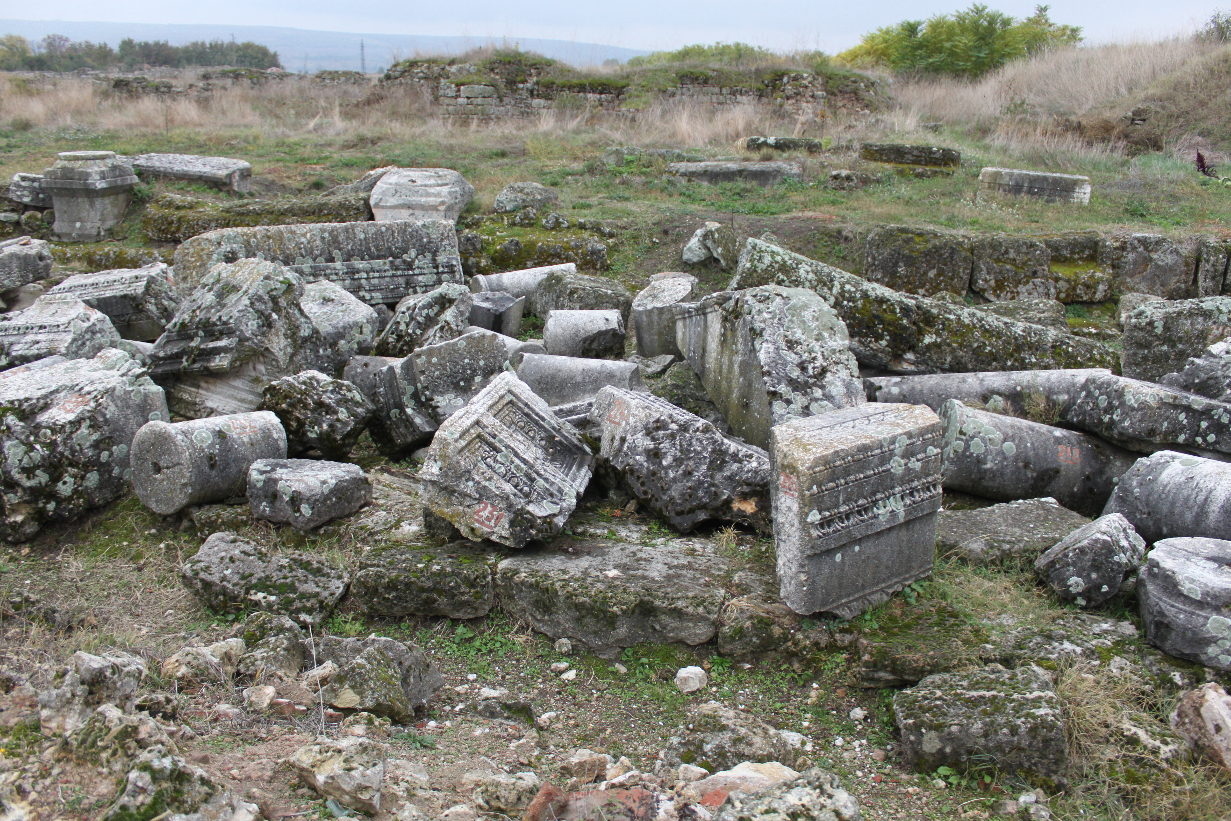 Colonia Ulpia Oescus: lateinisch Ulpia Escus; Nordbulgarien; an der Donau; beim Dorf Gigen; menschenleer; eingezäunt; gepflegte Anlage